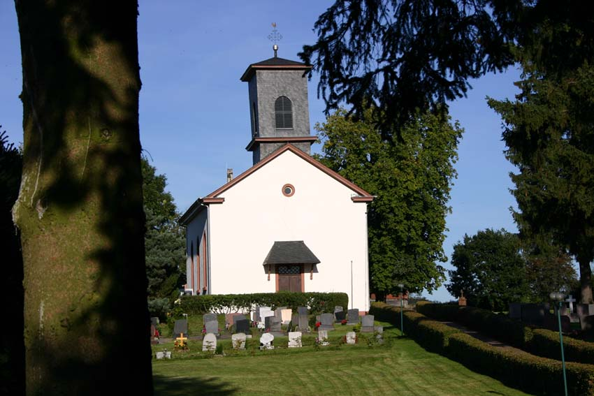 Beschreibung: Kirche auf dem Herrnhaag in Büdingen. Ursprung: Selbst fotografiert von Sven Teschke am 9. September 2004 Lizenzstatus: GNU FDL